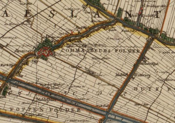 commandeurs polder.